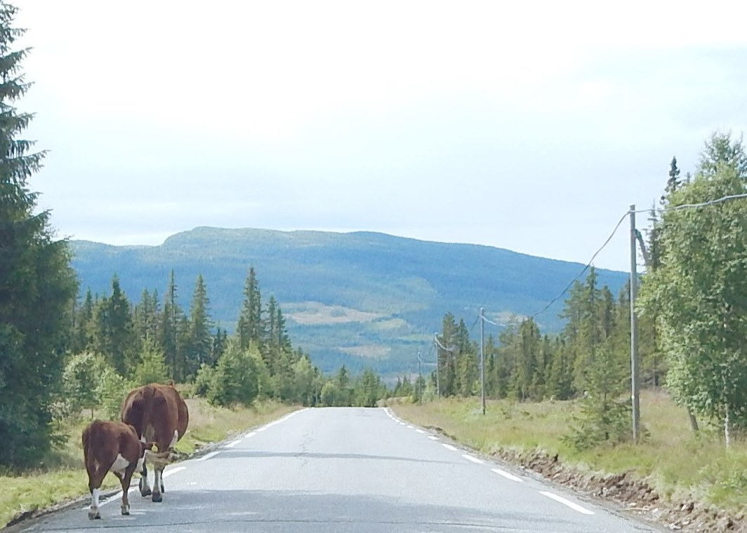 Kuer langs fylkesvei 2456 (tidl. 225)